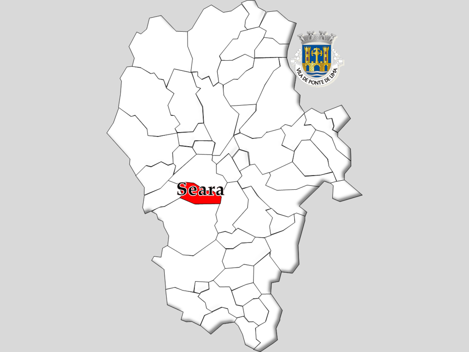 Censos 1864/2011